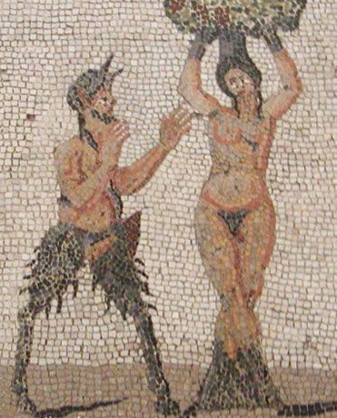 Mosaico romano con la escena de la metamorfosis de Pitis en pino ante Pan. Museo Archeologico Nazionale di Napoli (inv. nr. 27708).